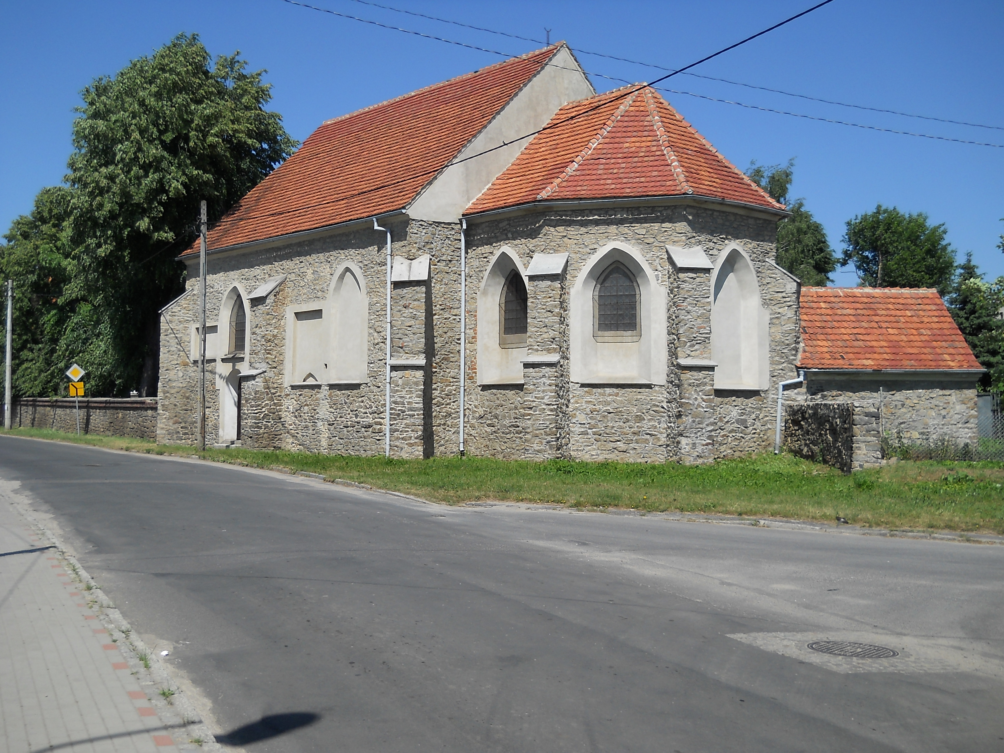 Strzegom-kościół pomoc.p.w.św. Jadwigi